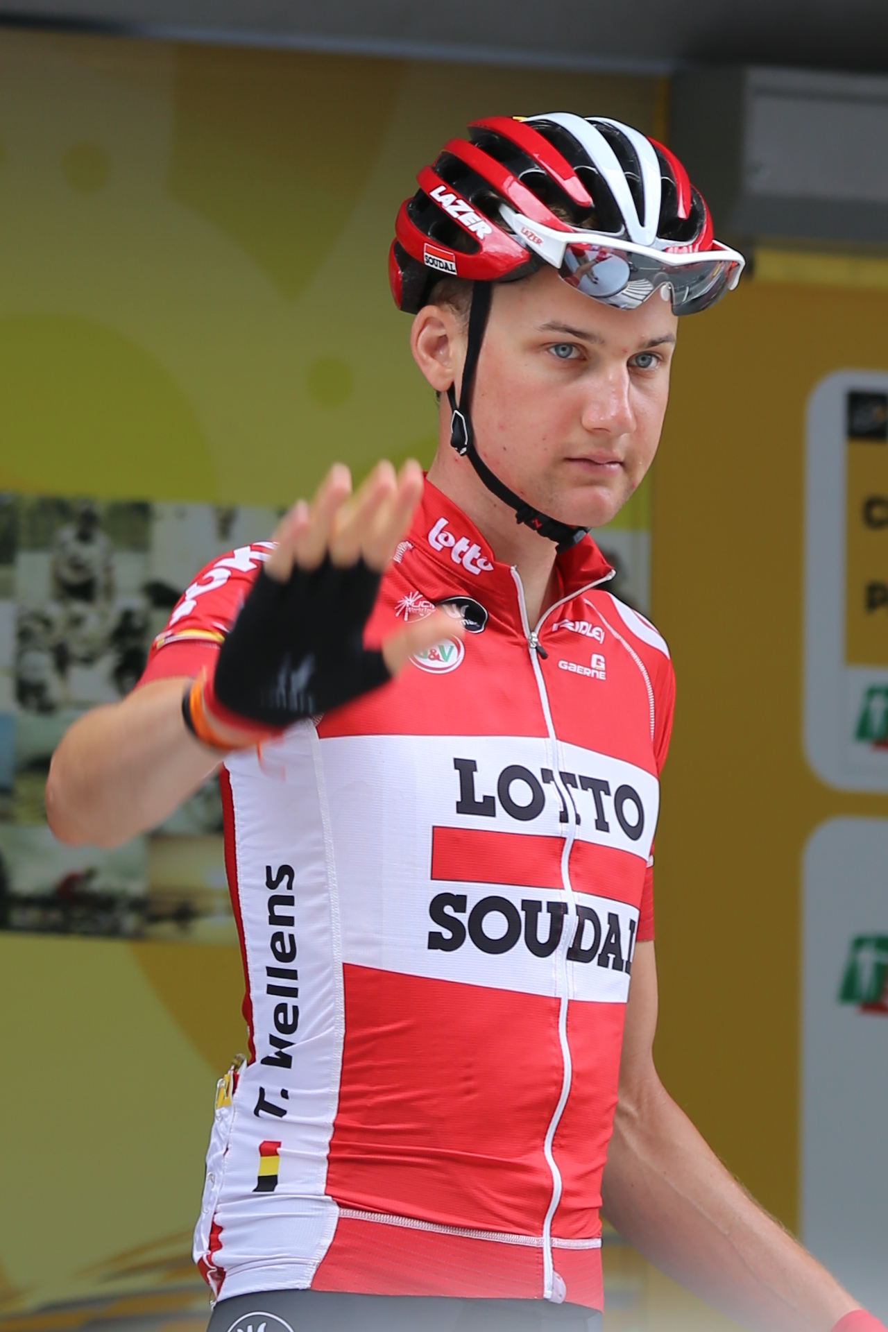 Tim Wellens lors du départ de la 8e étape du Tour de France 2015 à Rennes.